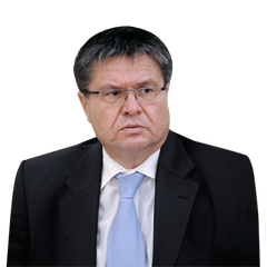 Персональная фотография